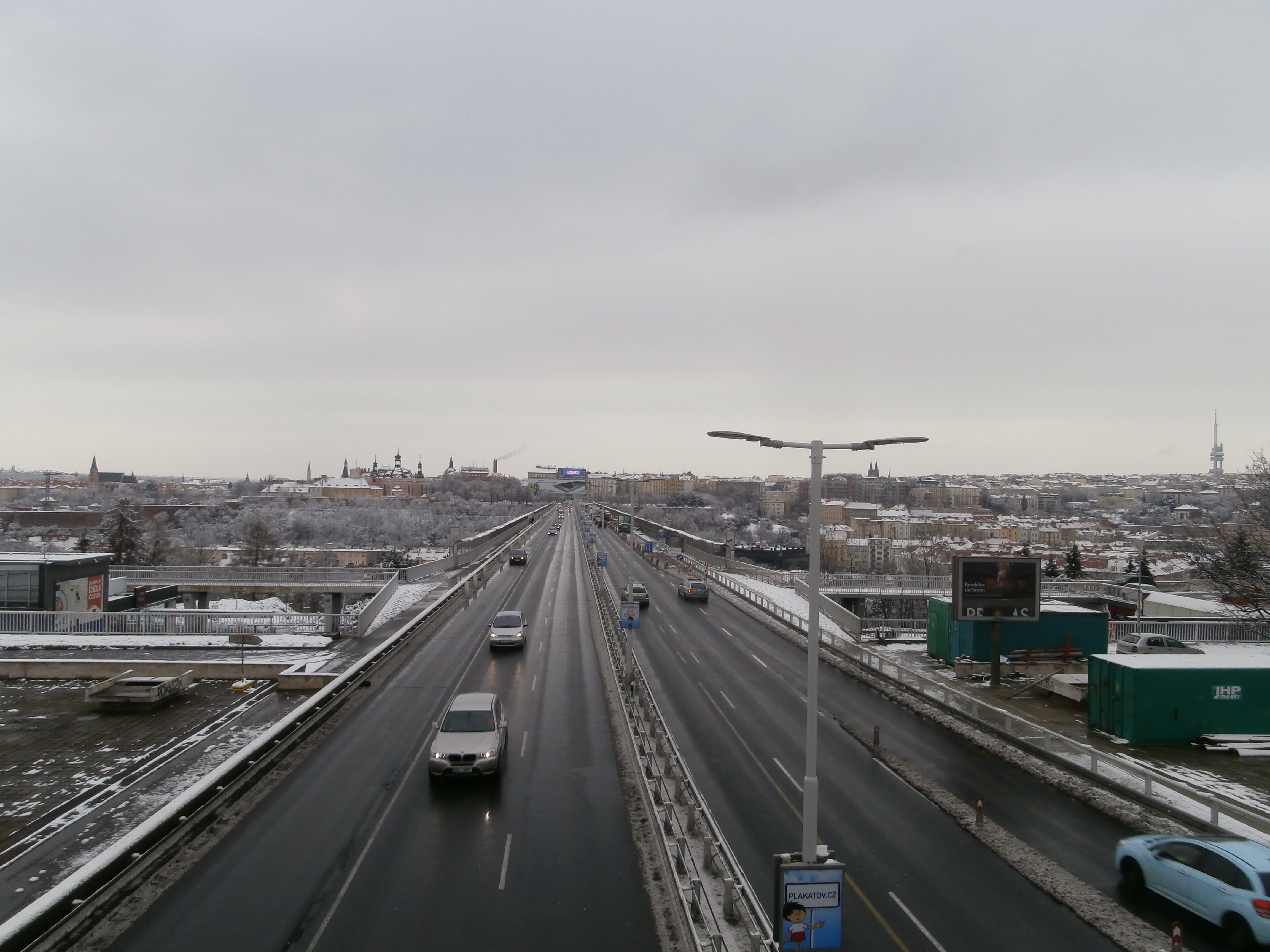 Severojižní magistrála, Nuselský most, v zimě, pohled směrem z Vyšehradu k severu, 1. 3. 2016, v pozadí Žižkovský vysílač